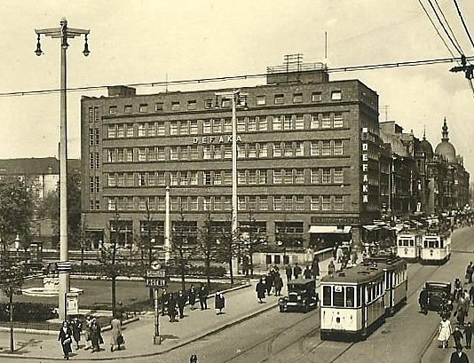 DeFaKa-Filiale in Gleiwitz / OS. Alte Ansichtskarte.